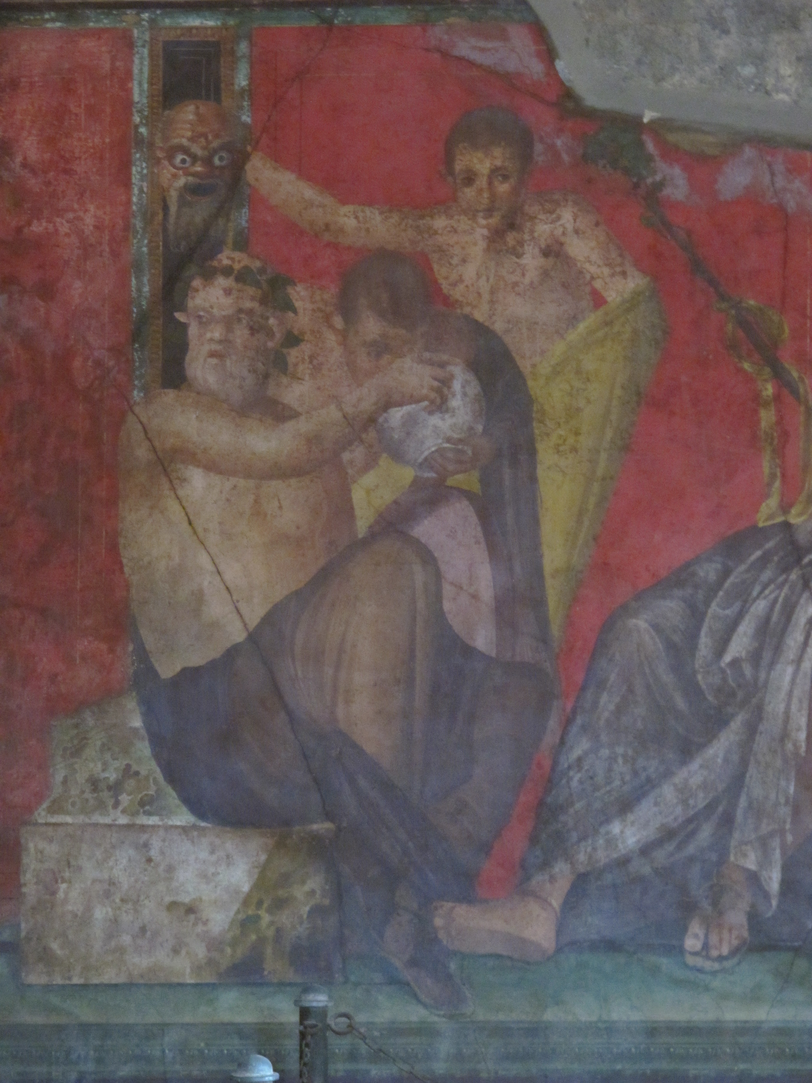 Pompei 2012